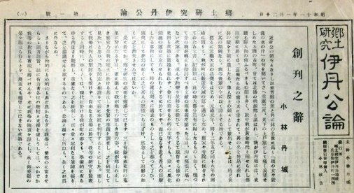 伊丹公論創刊号 パプリックドメインの写真（７０年以上）